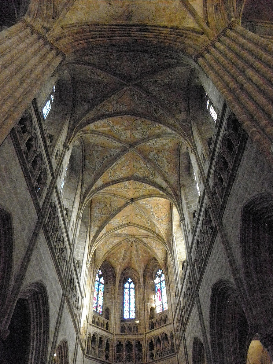 Chœur de la cathédrale Saint-Tugdual de Tréguier (22). .